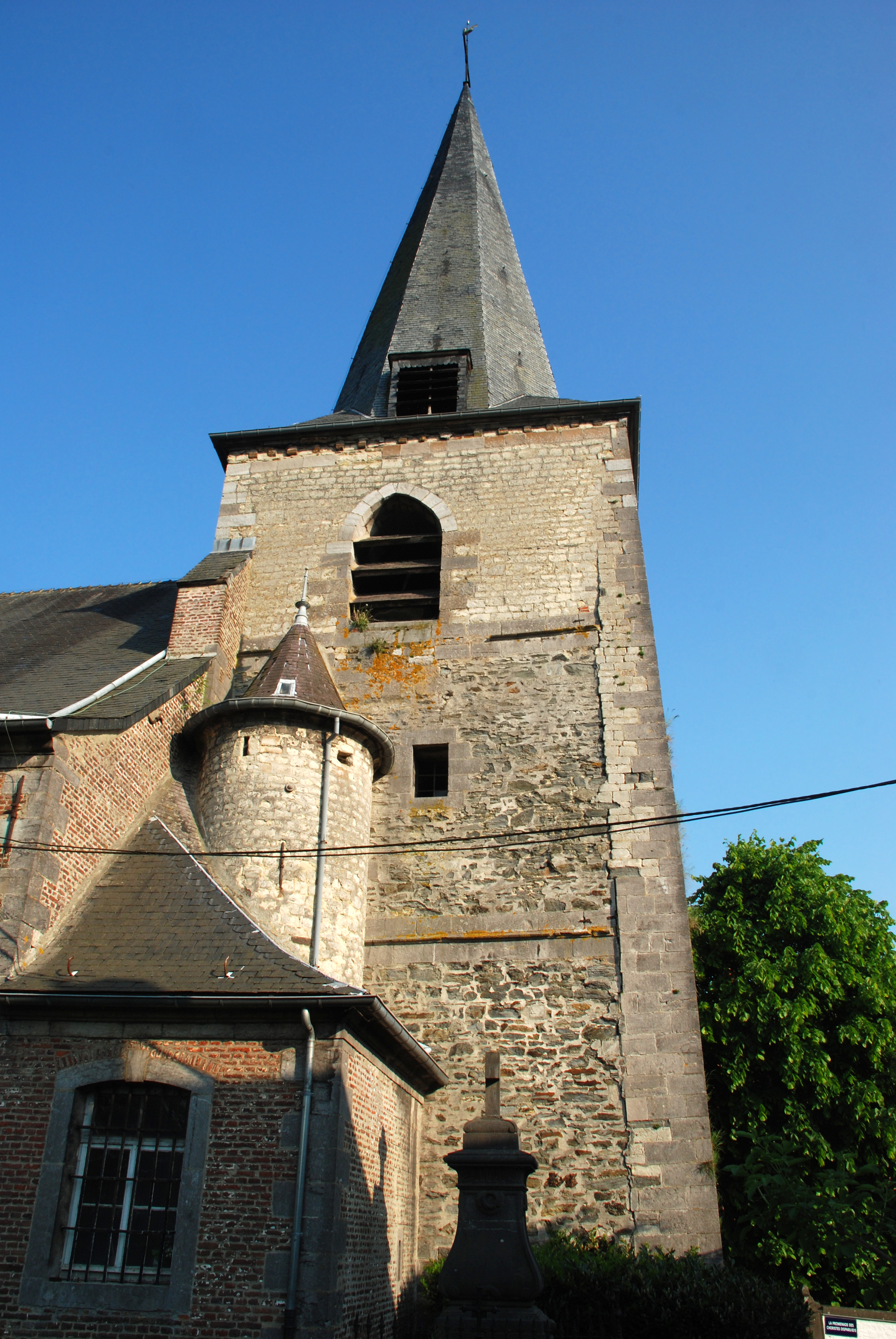 Belgique - Wallonie - Brabant wallon - Église de Court-Saint-Étienne